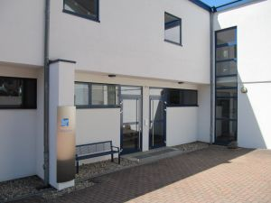 Büchereizentrale Niedersachsen Eingangsbereich Neubau